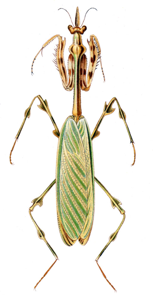 Zoolea lobipes